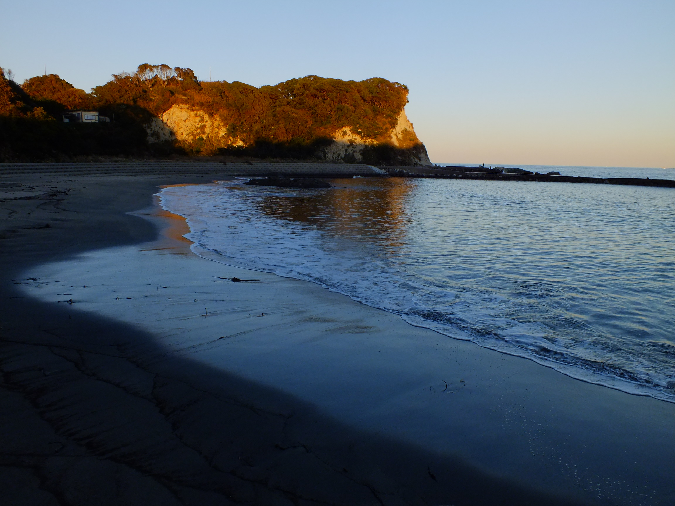 2013-11-30 Hachiman-Misaki Ohhara Isumi いすみ市大原八幡岬